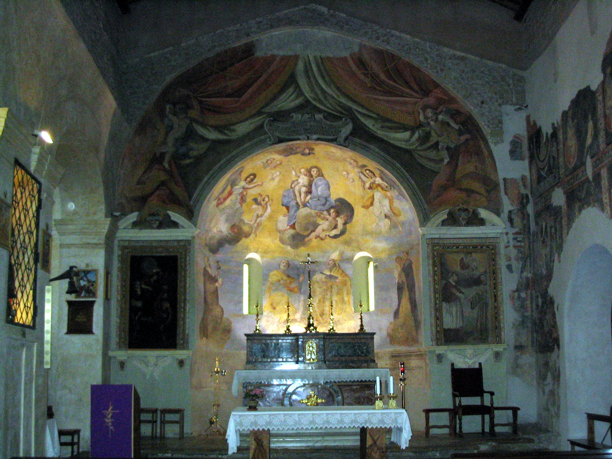 Ceri, Cerveteri, santuario di Santa Maria Immacolata, interno.